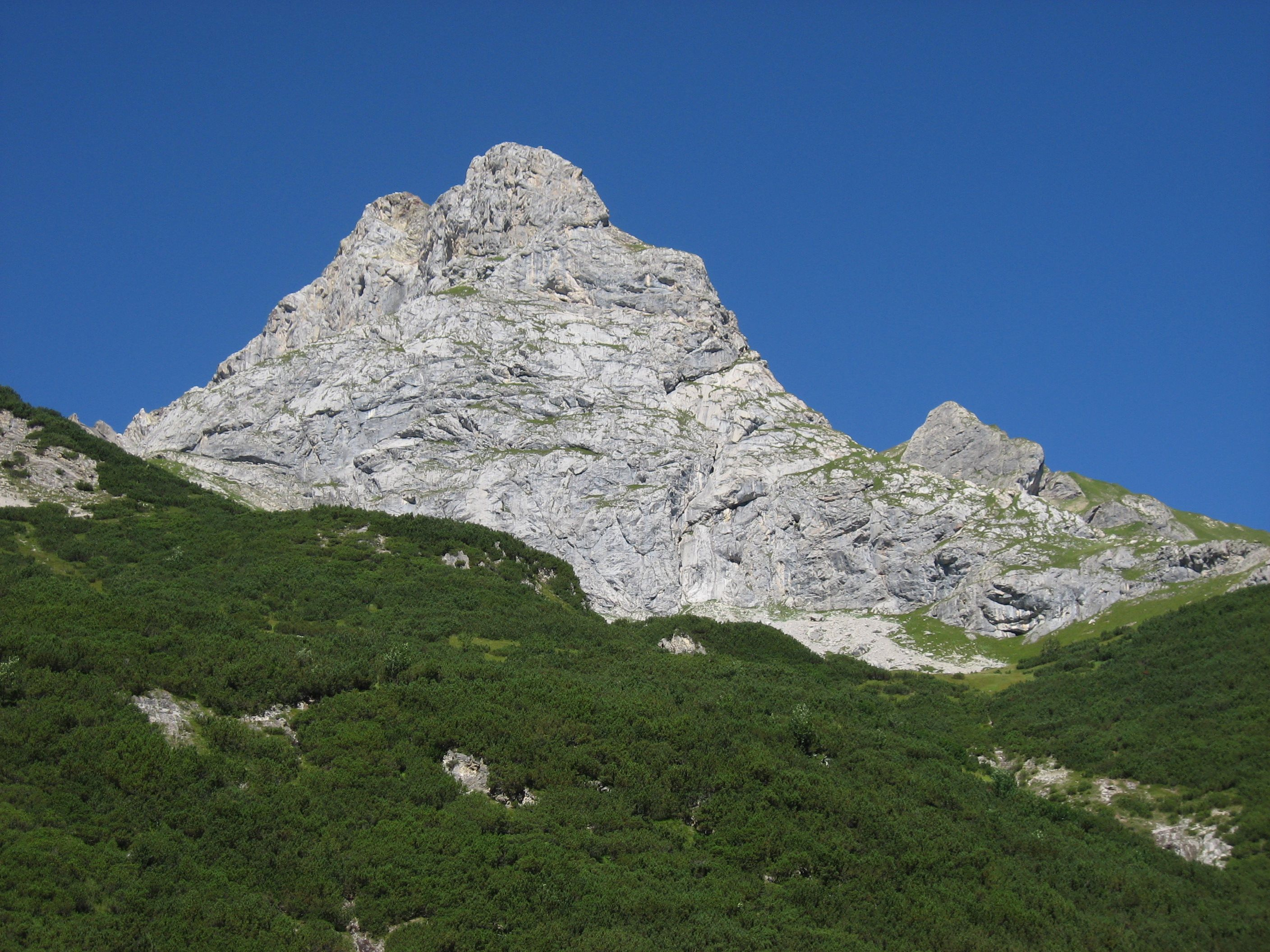 Die Fallenbacherspitze (2723 m) in den Lechtaler Alpen. Blick vom oberen Alperschontal Richtung Nordwesten.